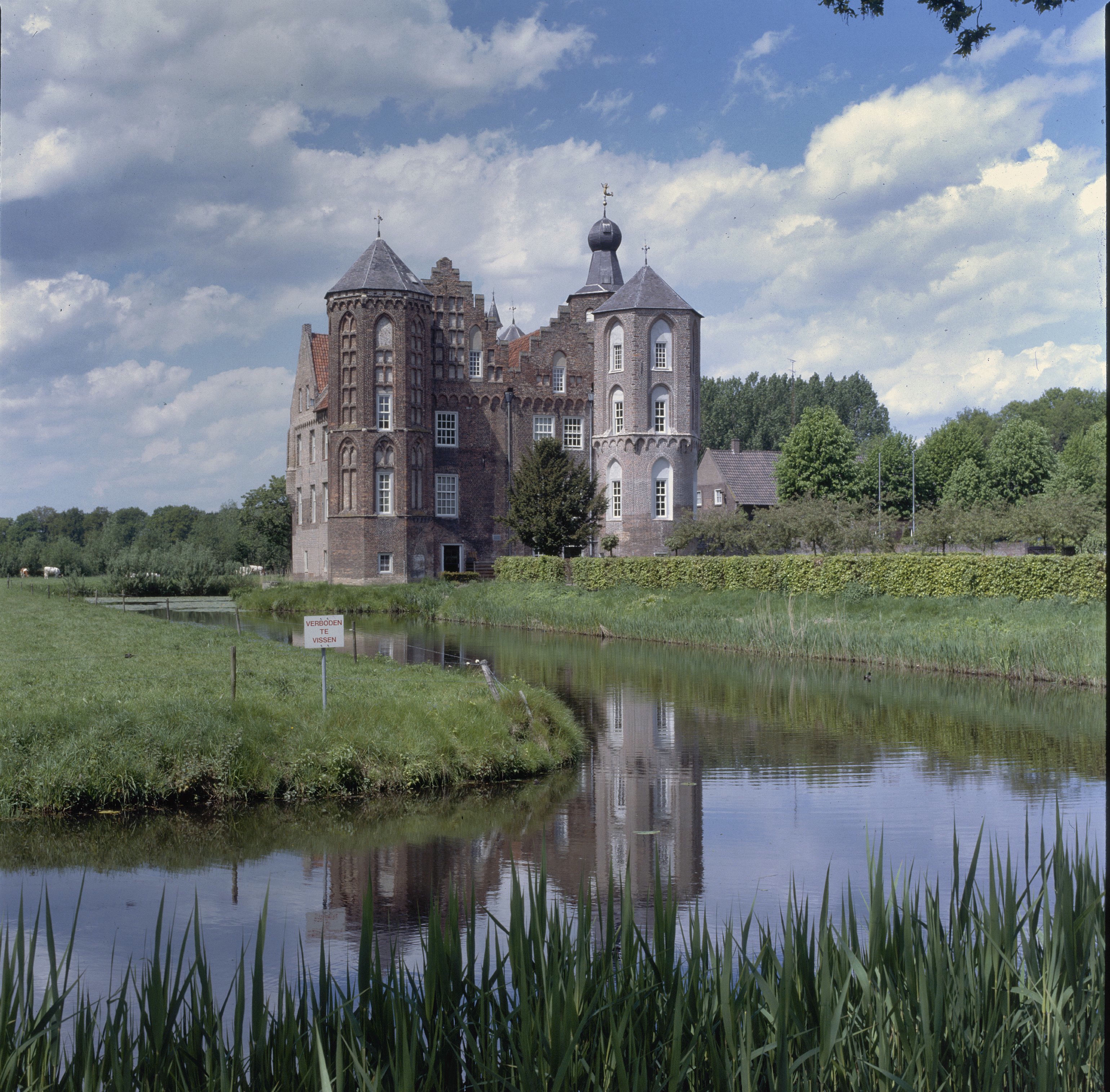 Kasteel Croy: Overzicht linker zijgevel met hoektorens en gedeelte achtergevel (opmerking: Gefotografeerd voor Monumenten In Nederland Noord-Brabant)